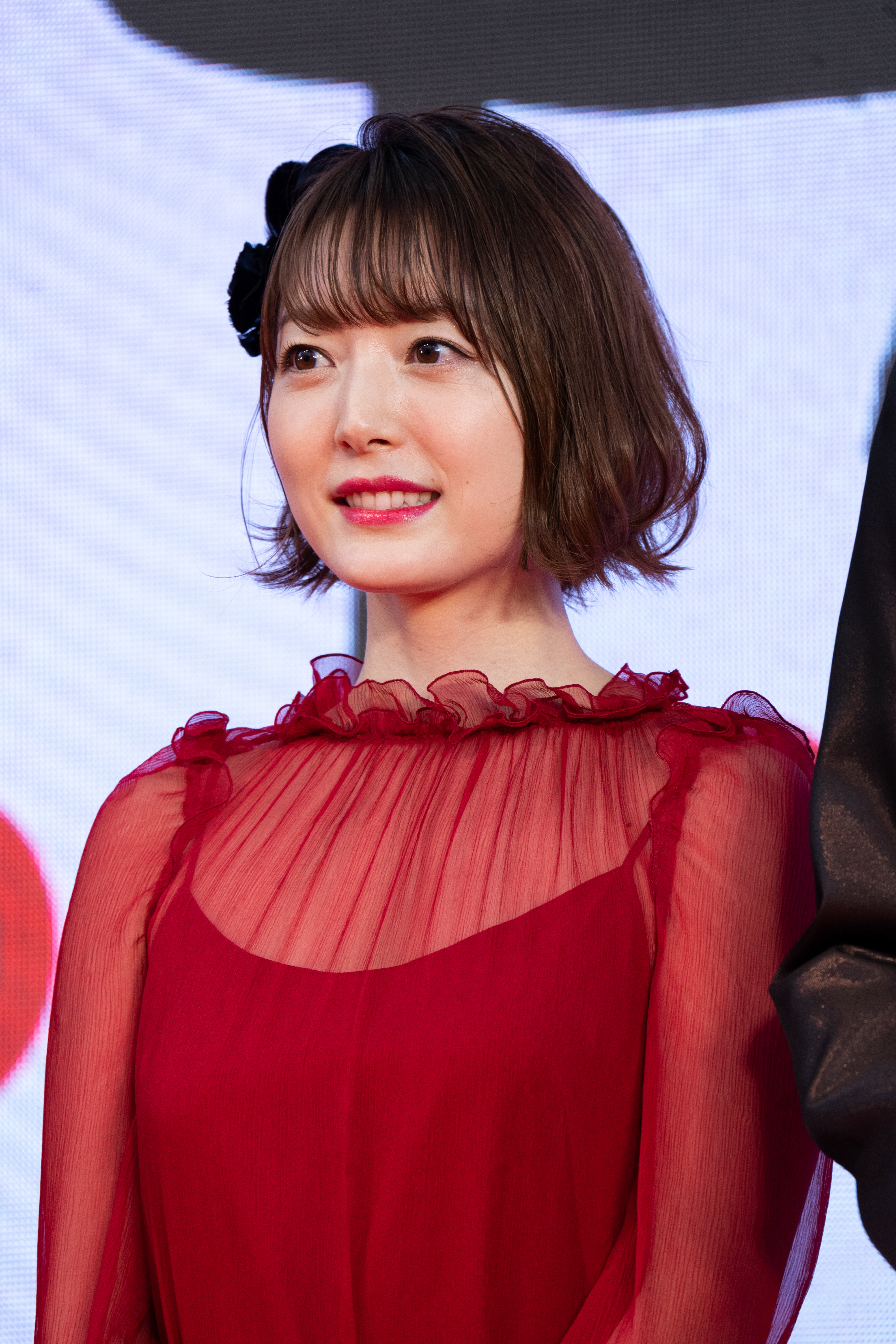 第32回 東京国際映画祭 オープニングセレモニー 花澤香菜 (HUMAN LOST 人間失格)